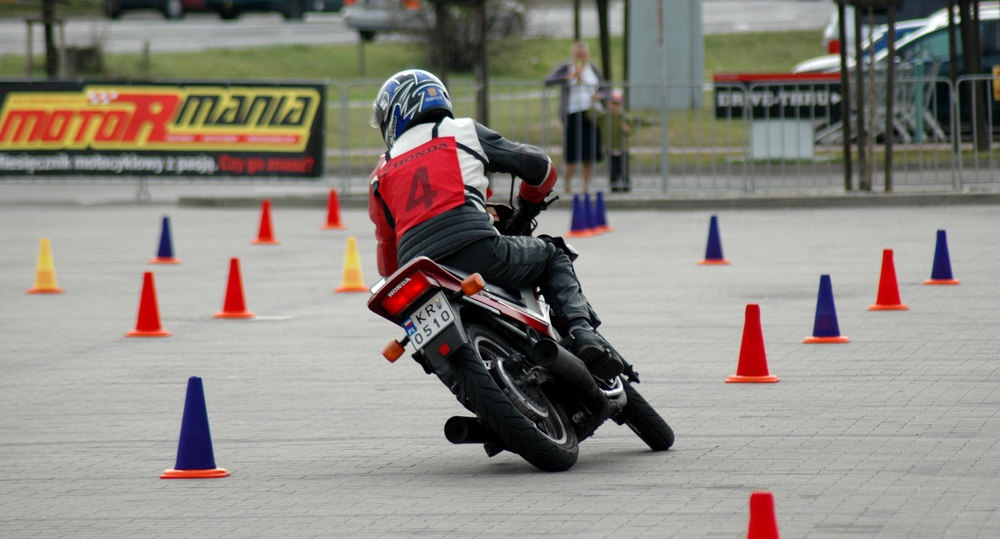 Kolor pachołków oznacza w jaki sposób i z której strony należy je omijać. Zawodnik Krzysztof Kupiec na trasie konkursowej, runda finałowa Honda Gymkhana 2012